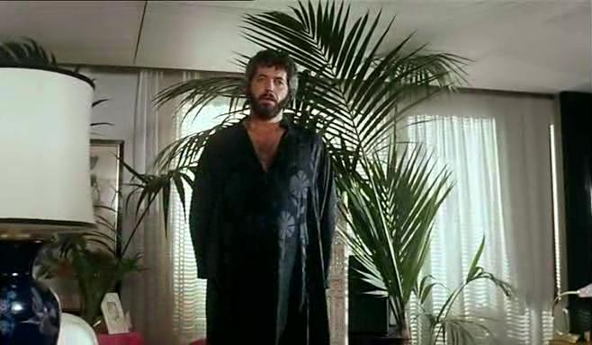 Screenshot dal film Borotalco di Carlo Verdone.